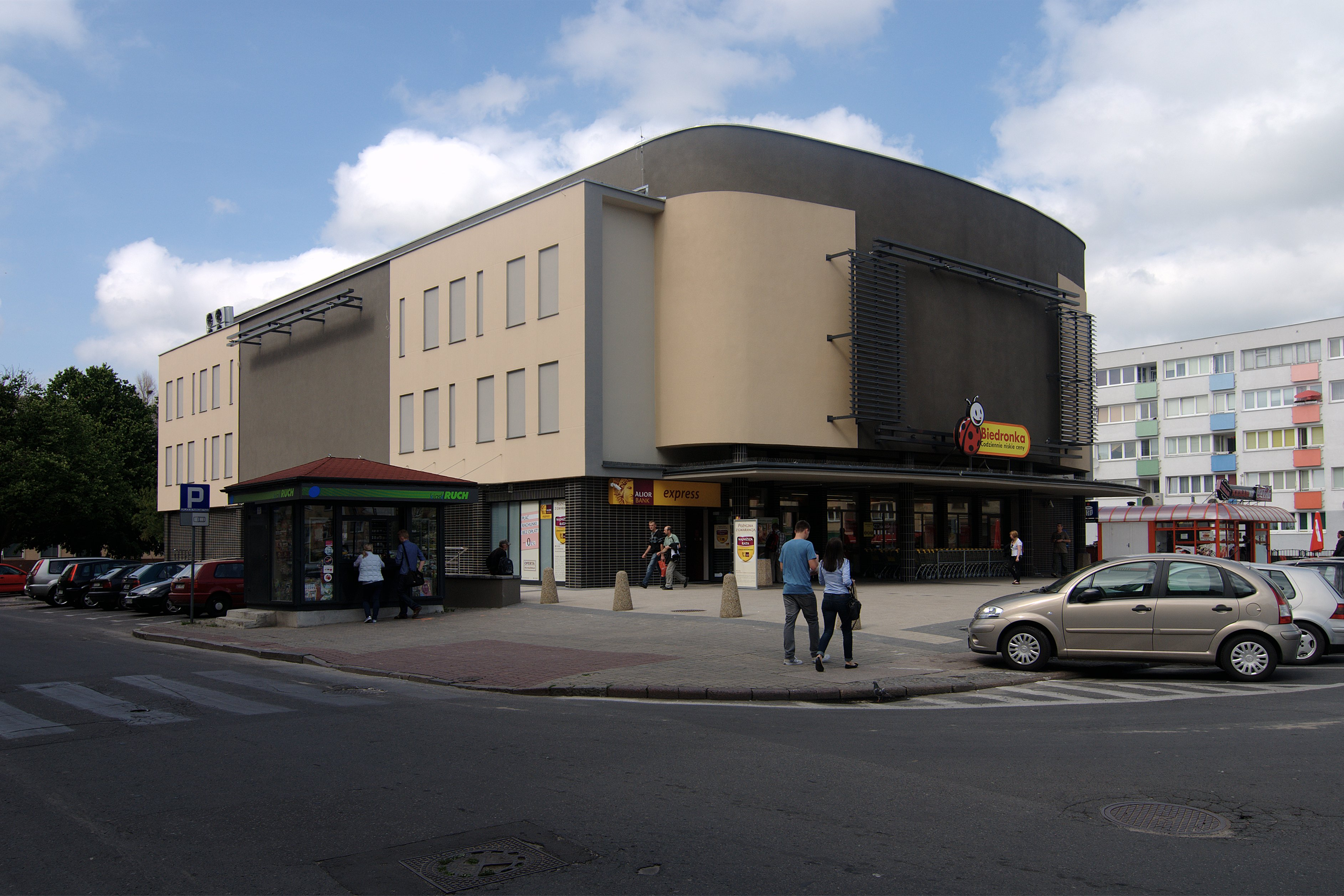 Słupsk. Sklep Biedronka, dawniej kino Millenium.